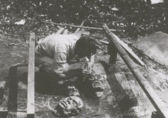 Aleksanteri Ahola-Valo työssään; Tekijänoikeuksien haltija: Valola-Säätiö